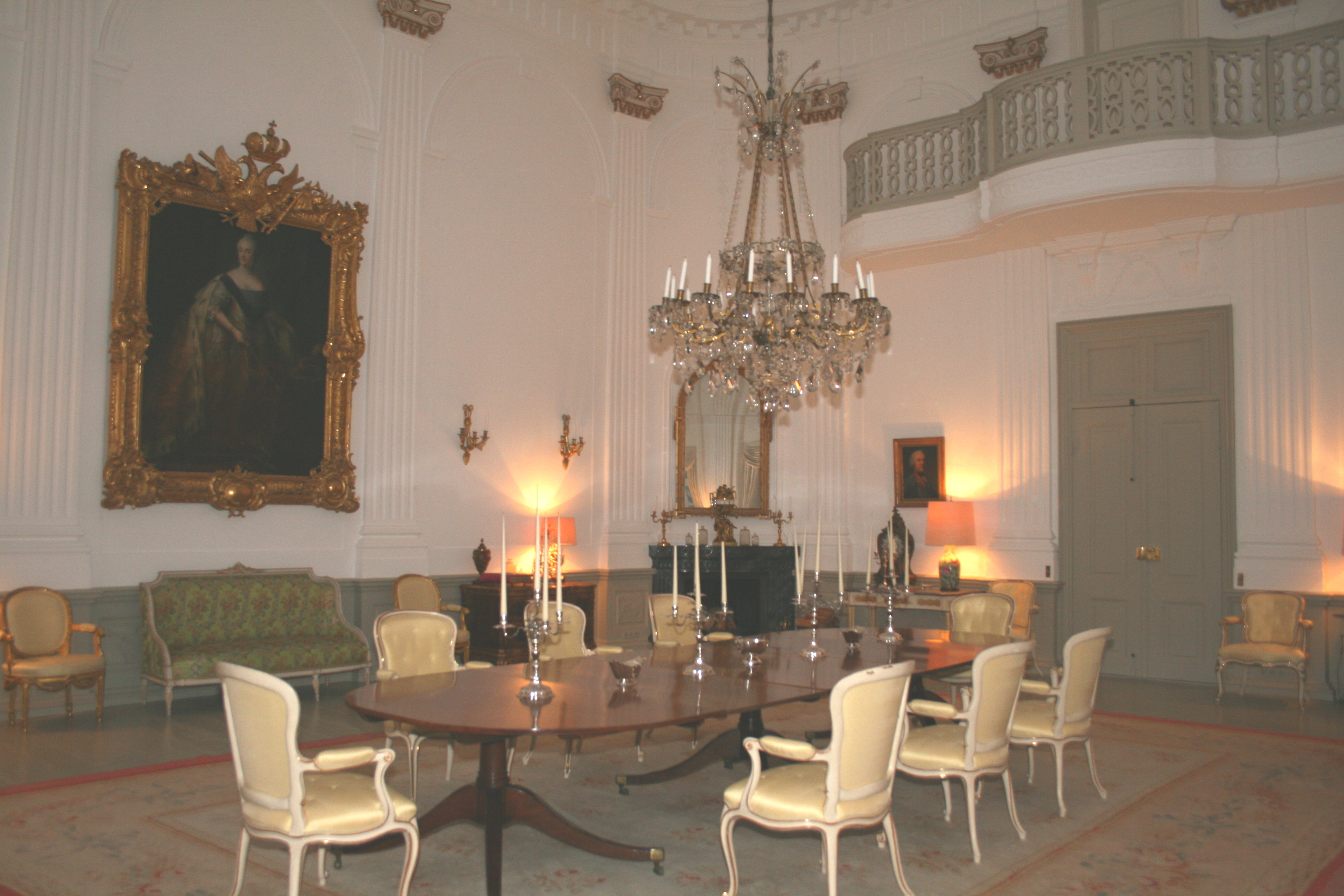 Saal im Gutshaus von Schierensee